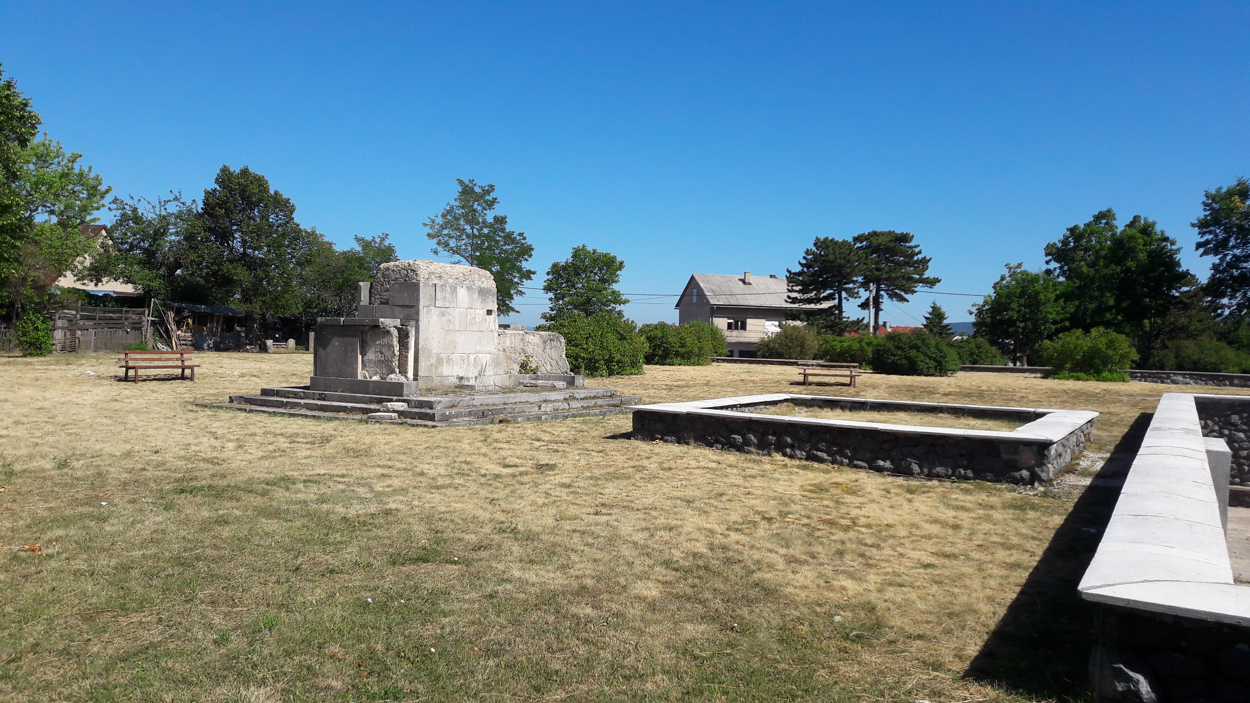 Jutbina, Kroaci